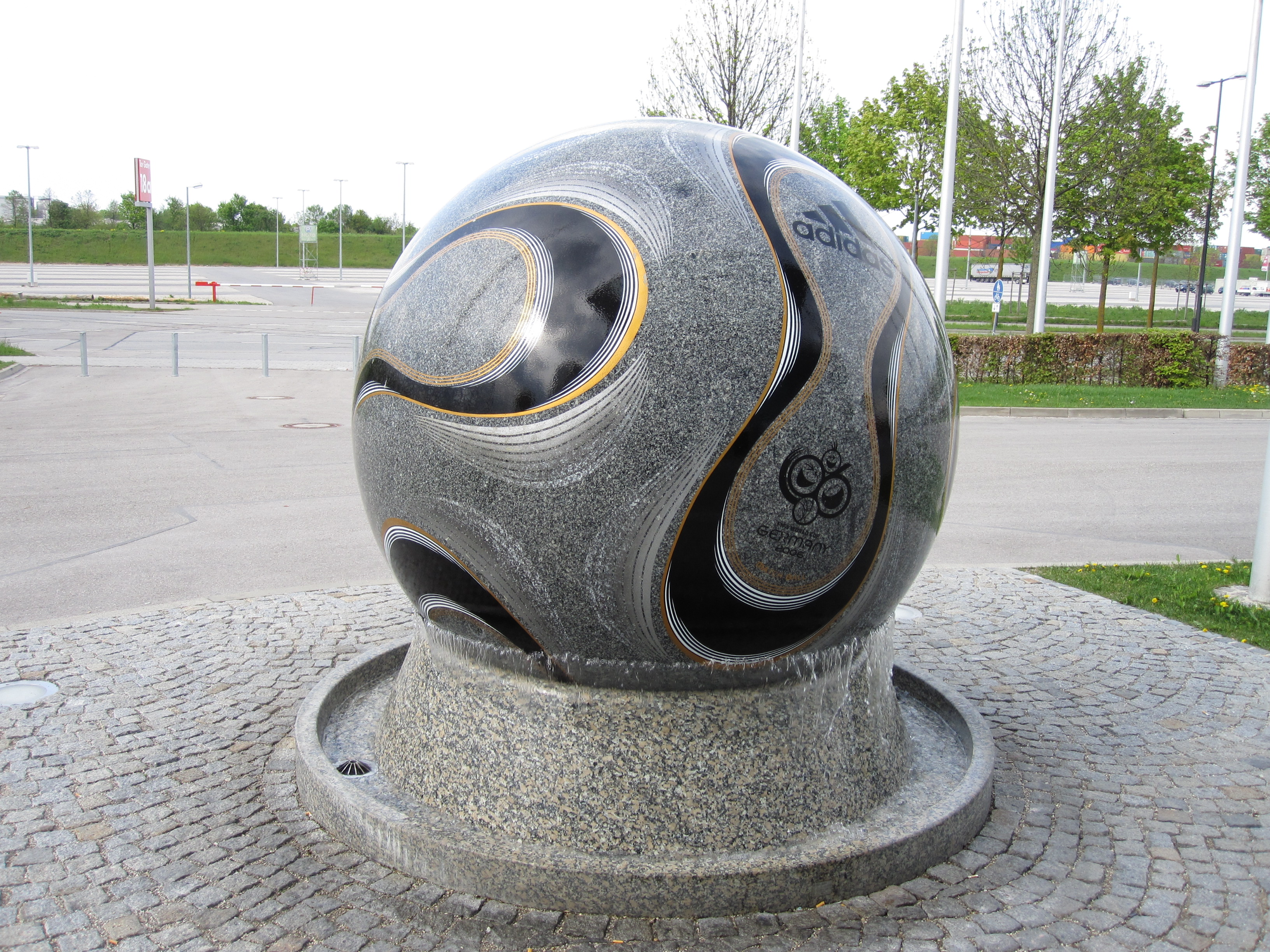 WM-Brunnen